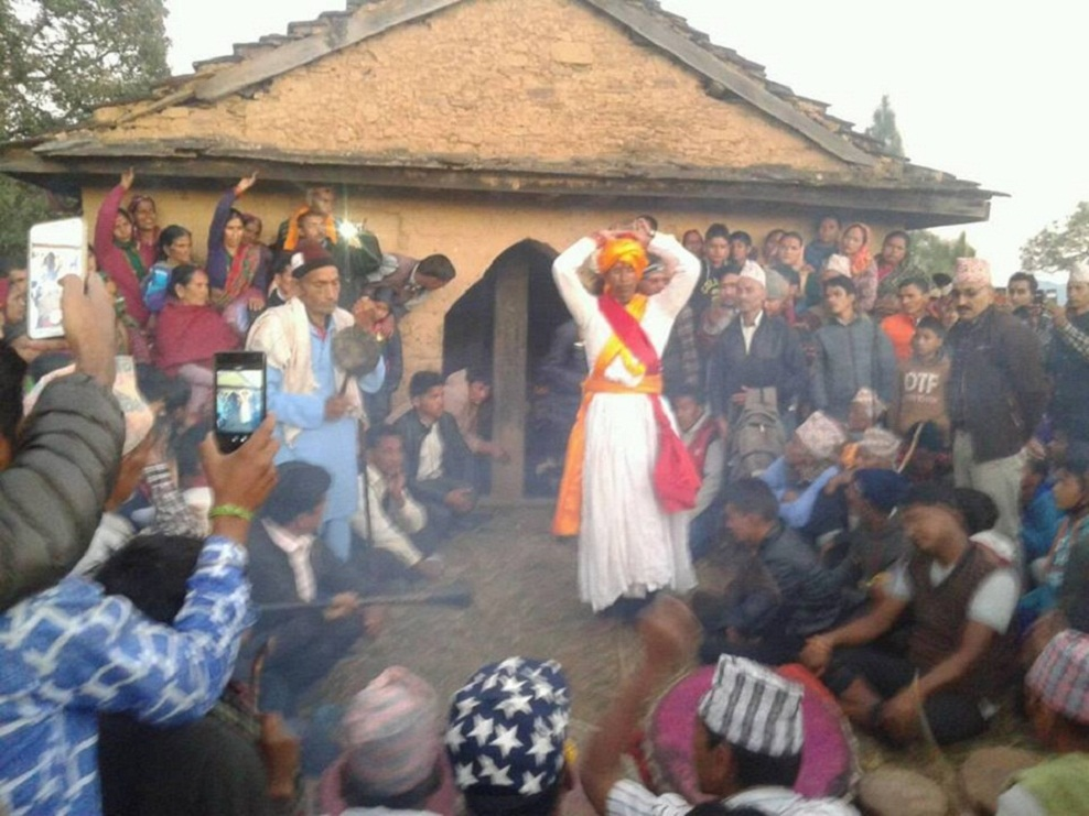 नेपाल भाषा: Chakaa Kedar